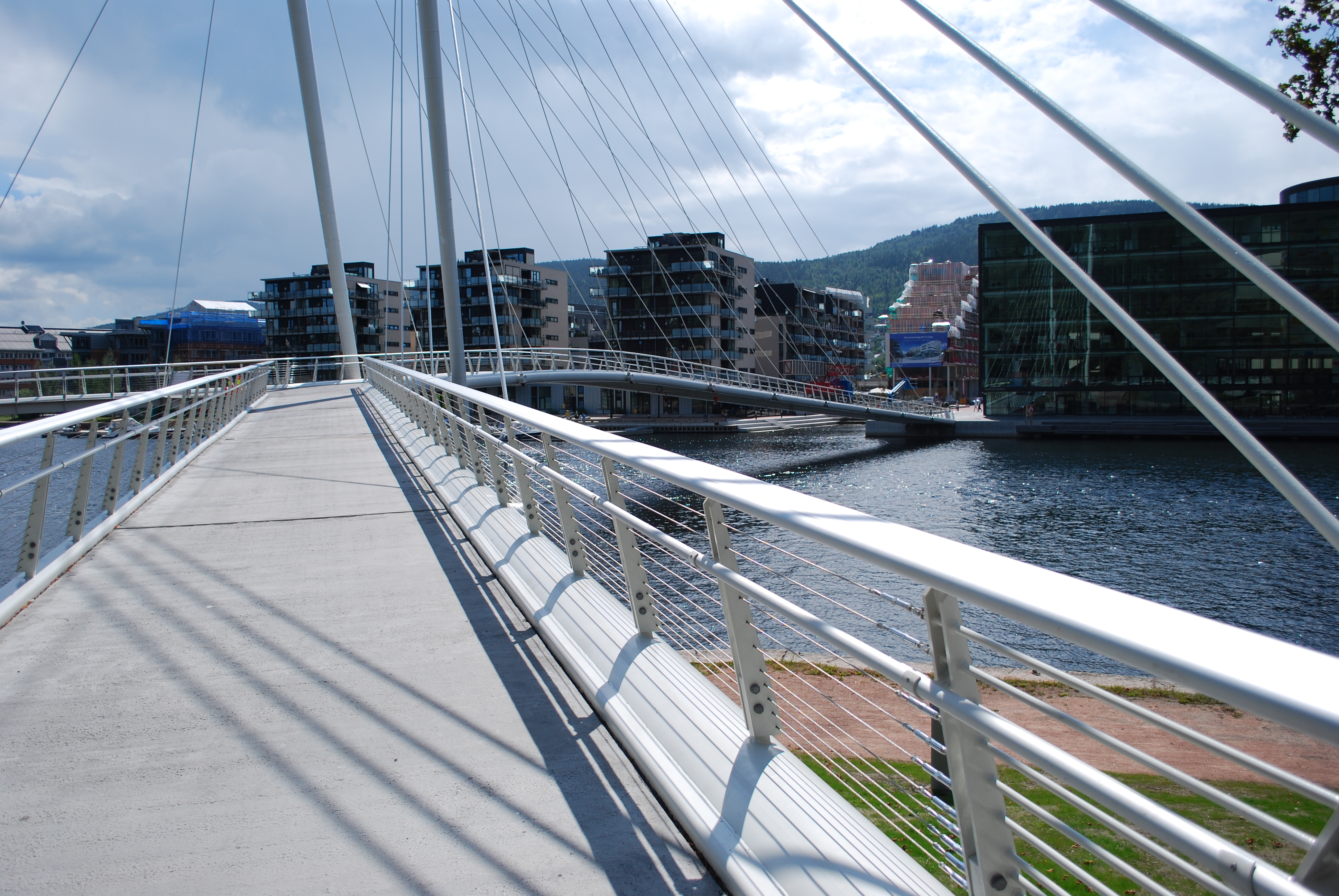 Ypsilon bru, Drammen, sett mot Union brygge